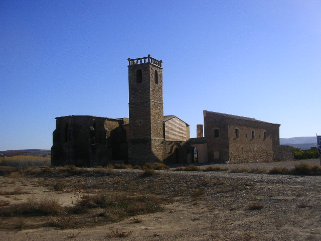 Monasterio de Avinganya en Seròs